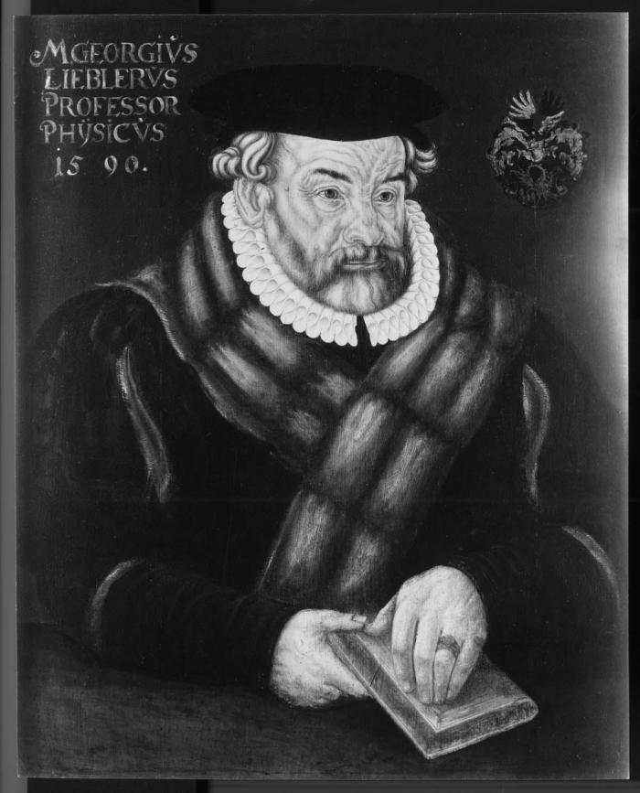 Georg Liebler (1524–1600), deutscher Philosoph, Philologe und Physiker, Tafelbild, Tübinger Professorengalerie, Inventar: 97/153